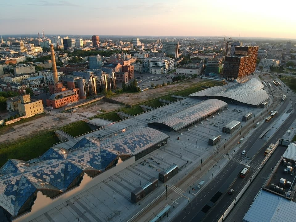 Dworzec Łódź Fabryczna i w perspektywie EC1 i jeden z elementów Bramy Miasta, ujęcie z góry